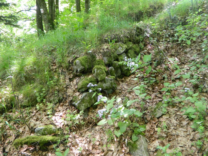 Château de Faîte - vestige de mur médieval